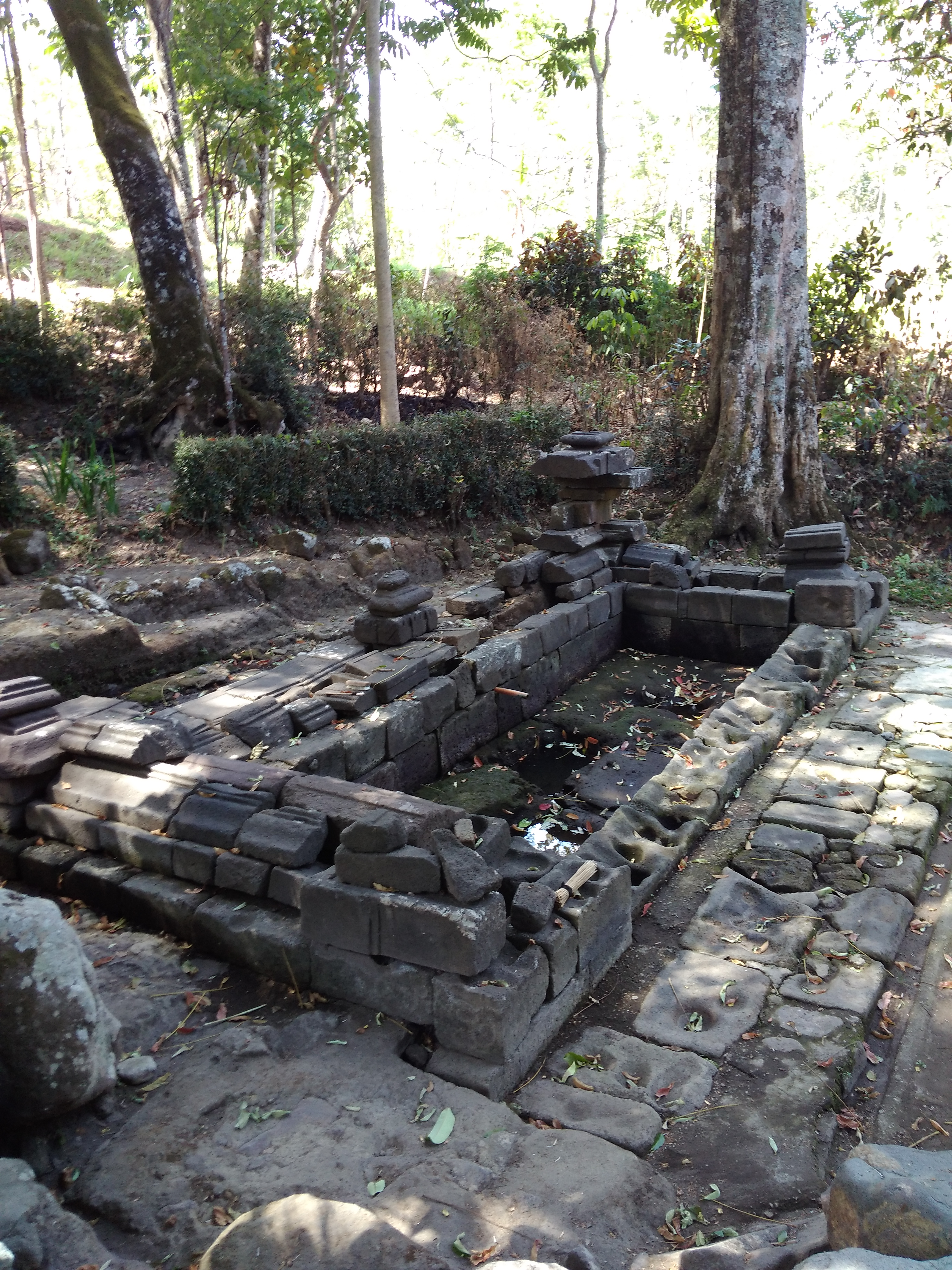 Situs Petirtaan Cabean Kunti